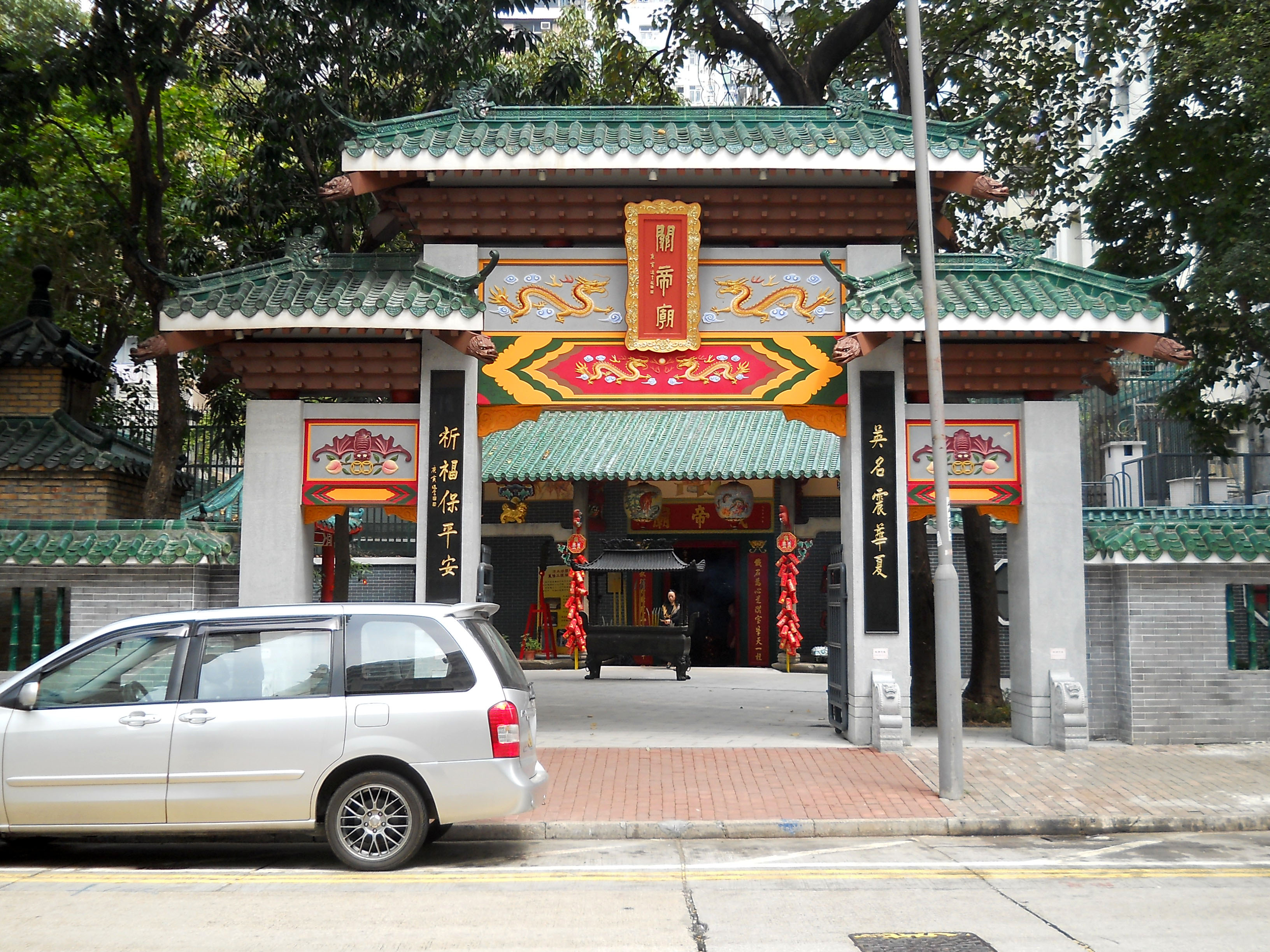 中文（香港）: 加建門樓後的深水埗關帝廟